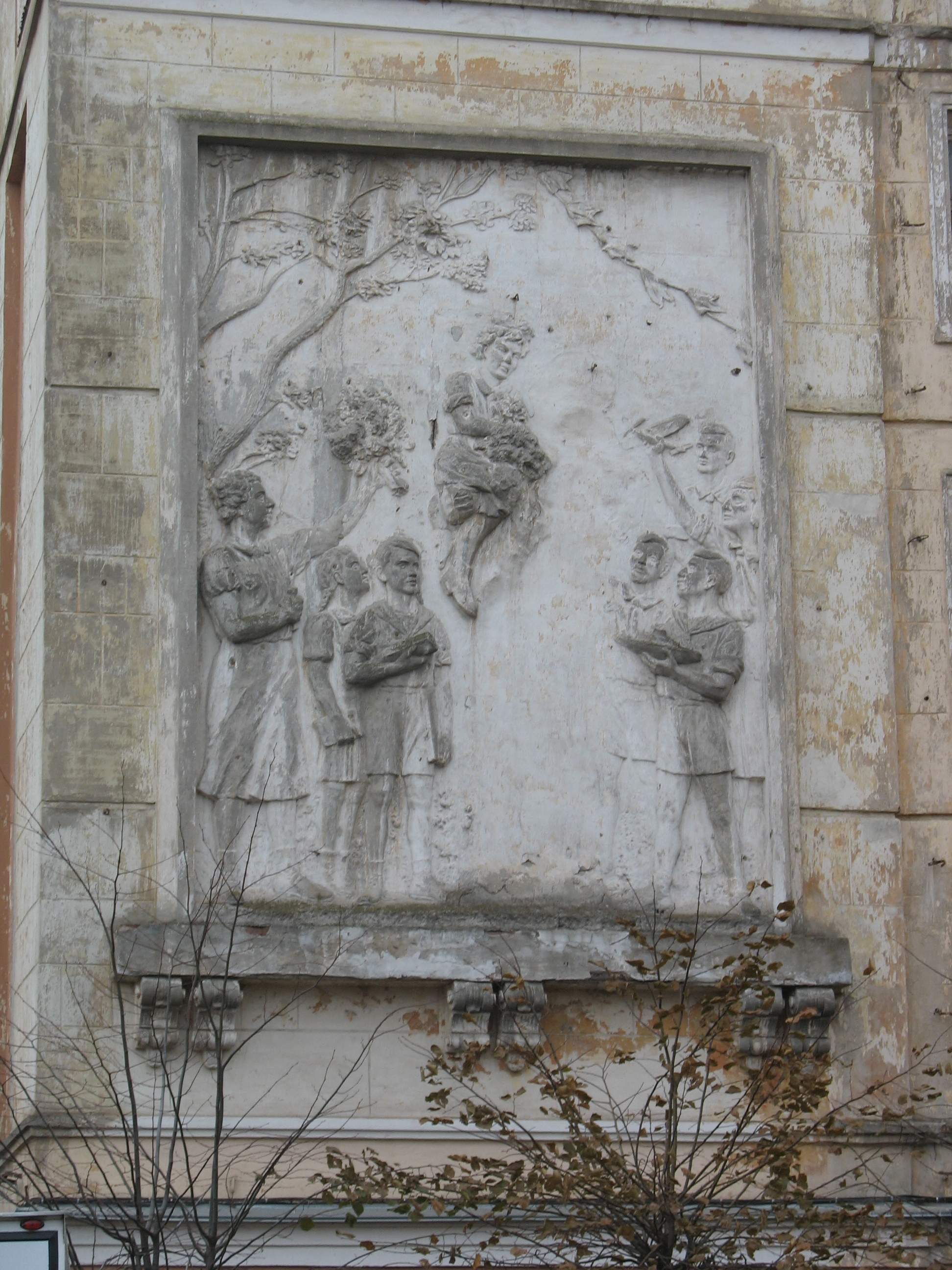 Депутатская улица Воронежа. Ансамбль. Левое панно. Девочка в воздухе; до 60-х годов на панно был Сталин